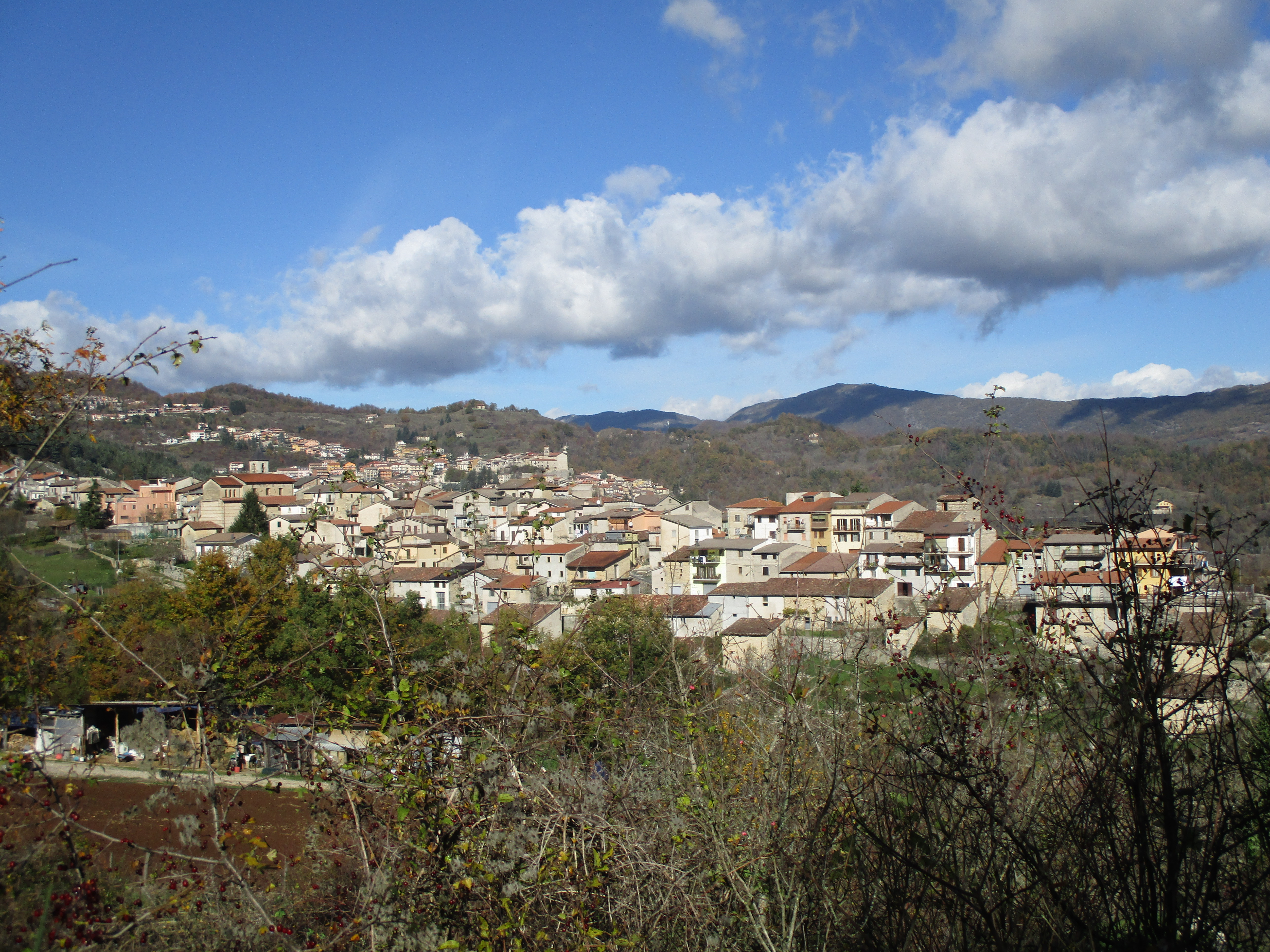 Panoramica di San Giovanni